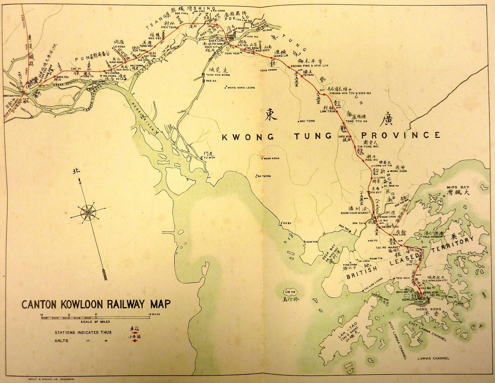 Map showing full alignment of the Canton-Kowloon Railway